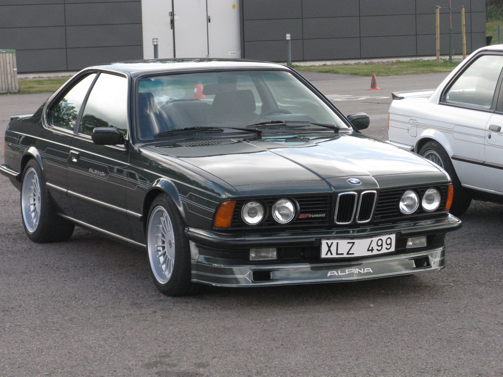 BMW Alpina B7 Turbo Coupé E24